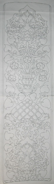 Рисунок савана Агафьи Грушецкой (1663-1681), русской царицы, первой жены россиийского царя Фёдора Алексеевича. Рисунок восстановлен Грушецким О.Л., по сохранившемуся рисунку XVII века (рисунок ткани (так называемая прорись) савана из захоронения царицы Агафьи Семёновны Грушецкой).